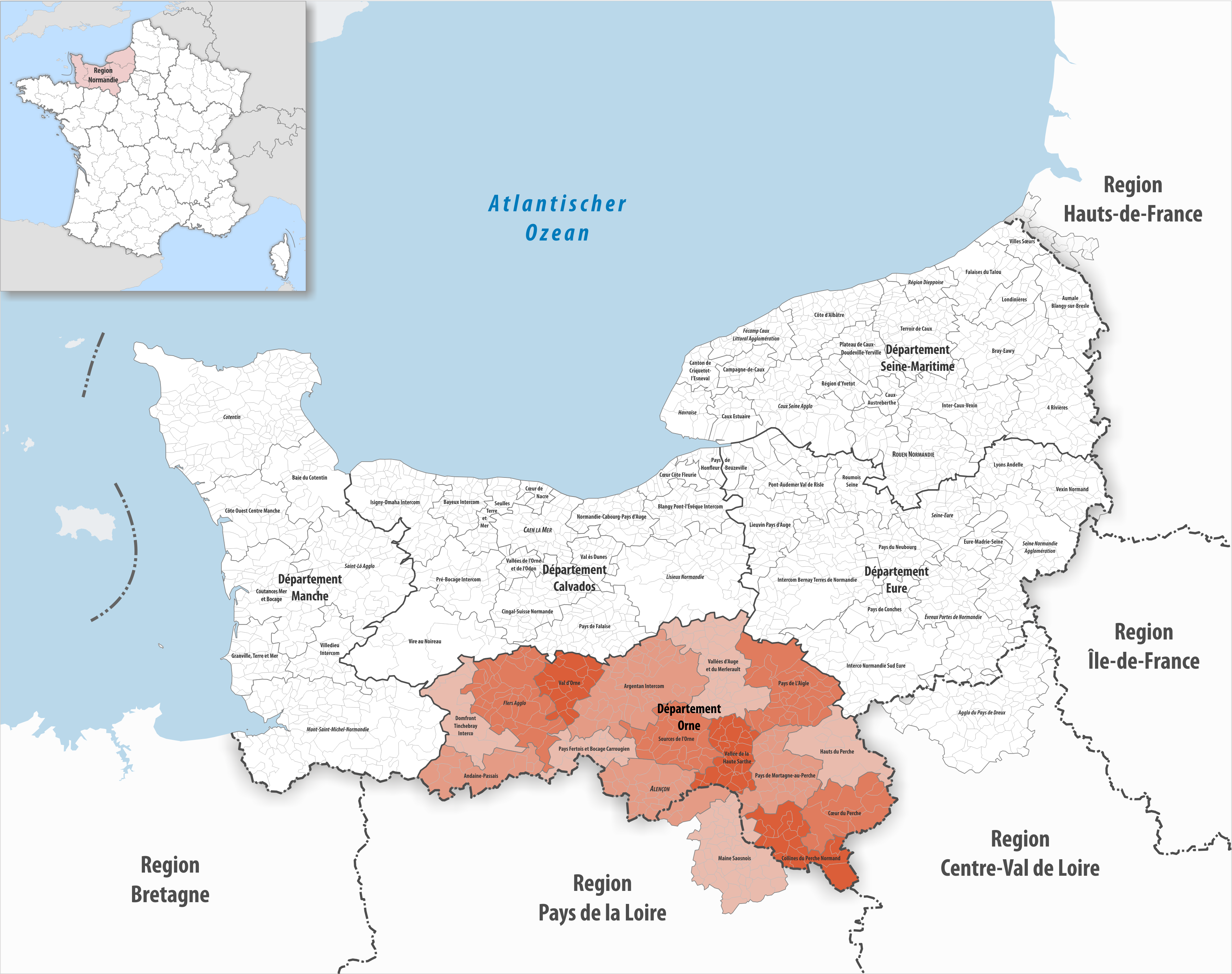 Gemeindeverbände im Département Orne